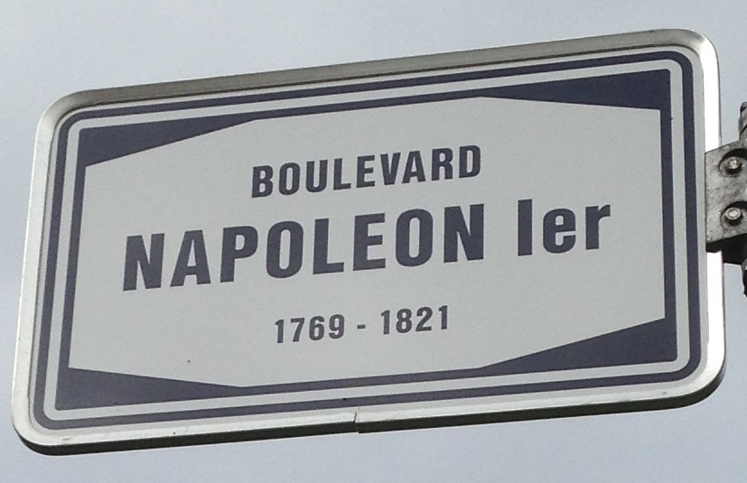 Stroosseschëld vum Boulevard Napoléon Ier am Quartier Rollengergronn/Belair-Nord an der Stad Lëtzebuerg.